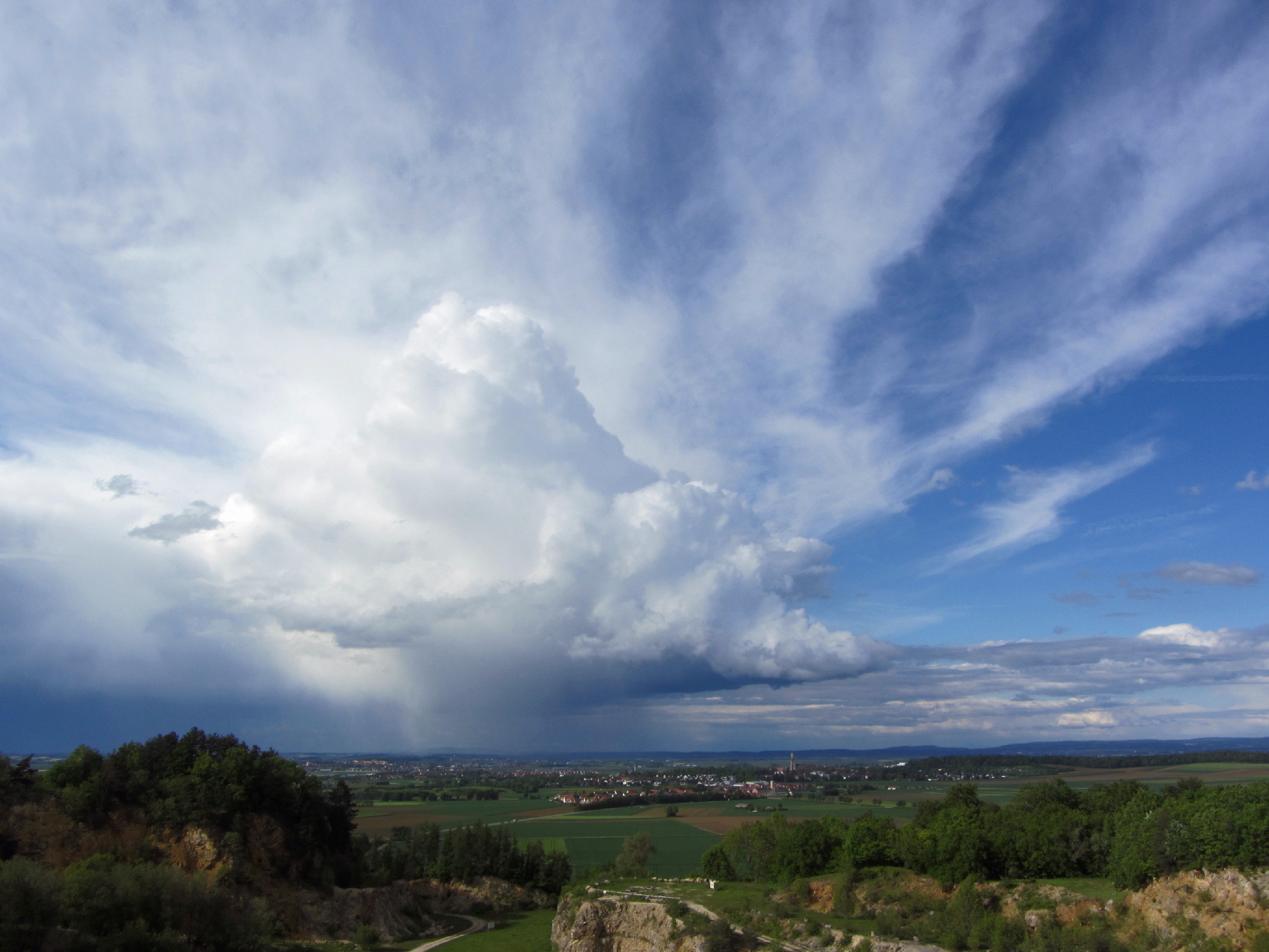 Blick auf den Meteoritenkraten von Süden ins Nördlinger Ries